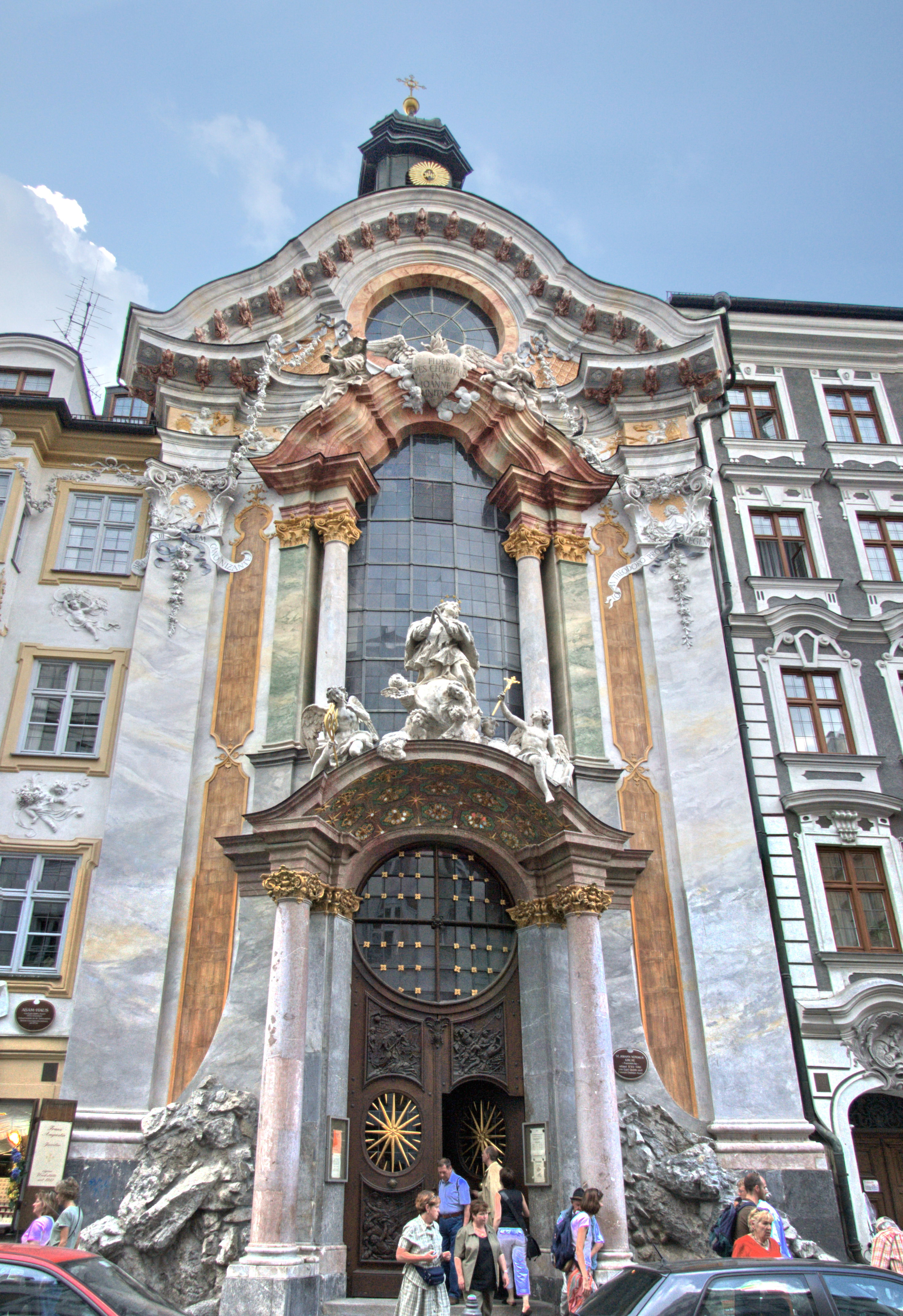 St. Johann Nepomuk (Asamkirche) München